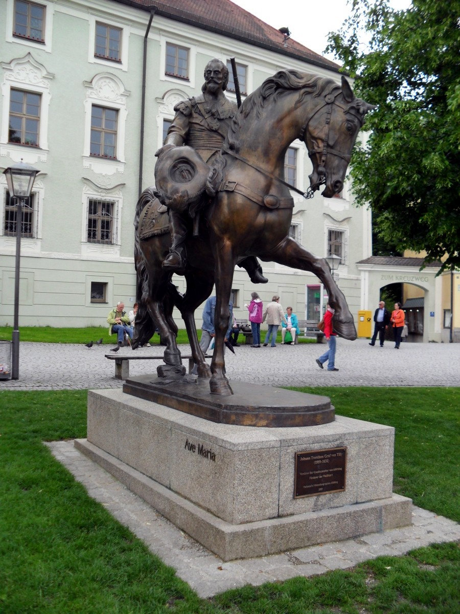 28.05.2011. _ Altötting